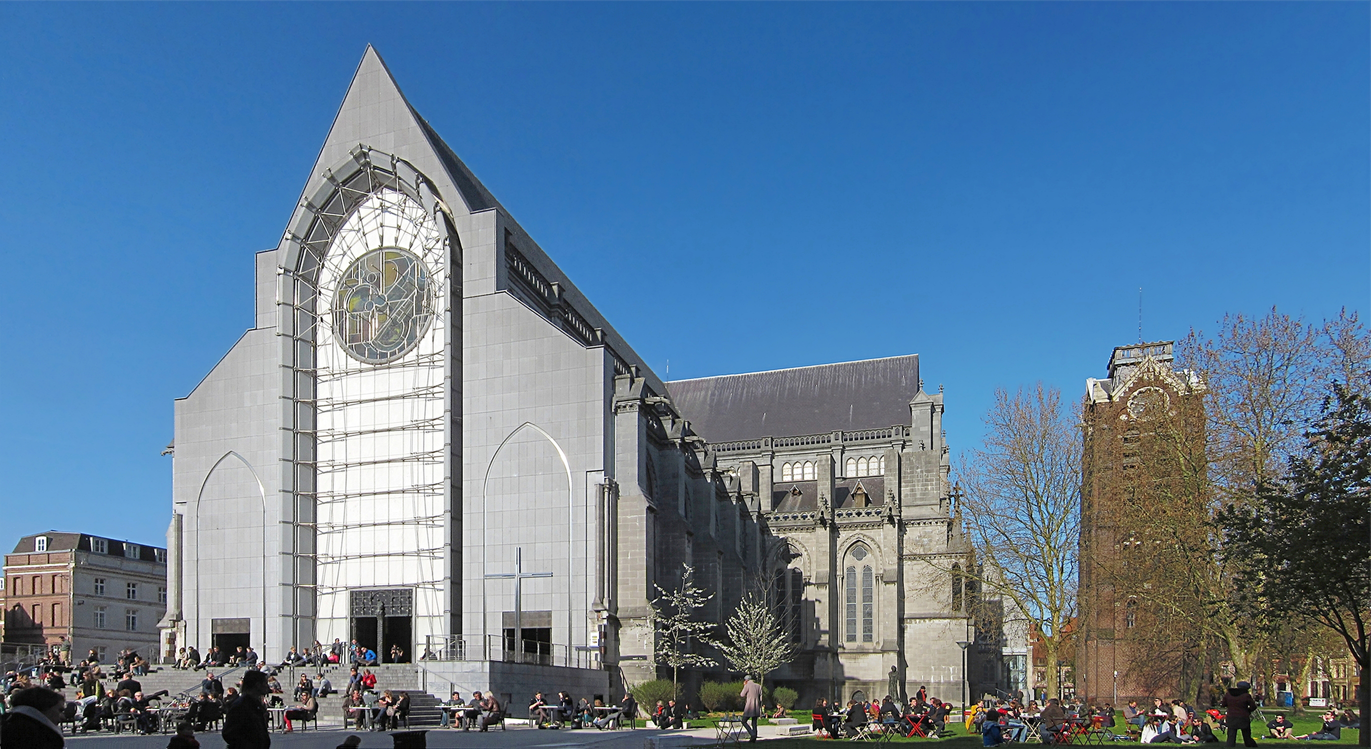 La Cathédrale Notre-Dame-de-la-Treille à Lille.